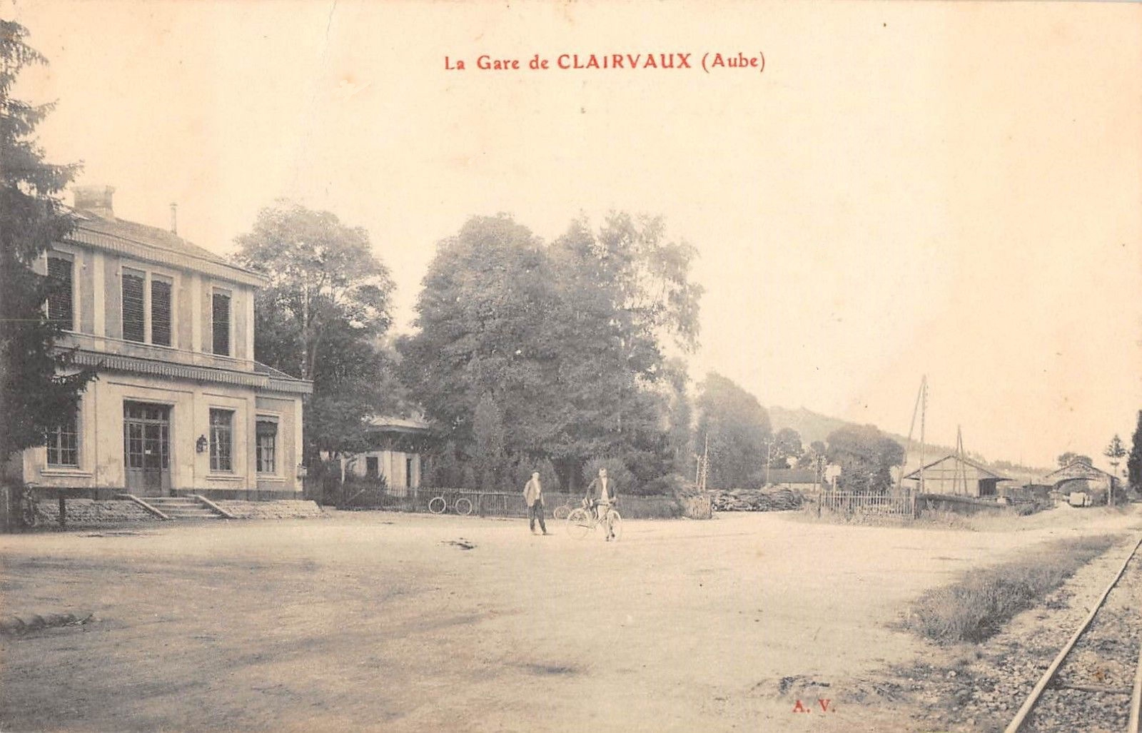 Carte postale d de la gare vers 1910.